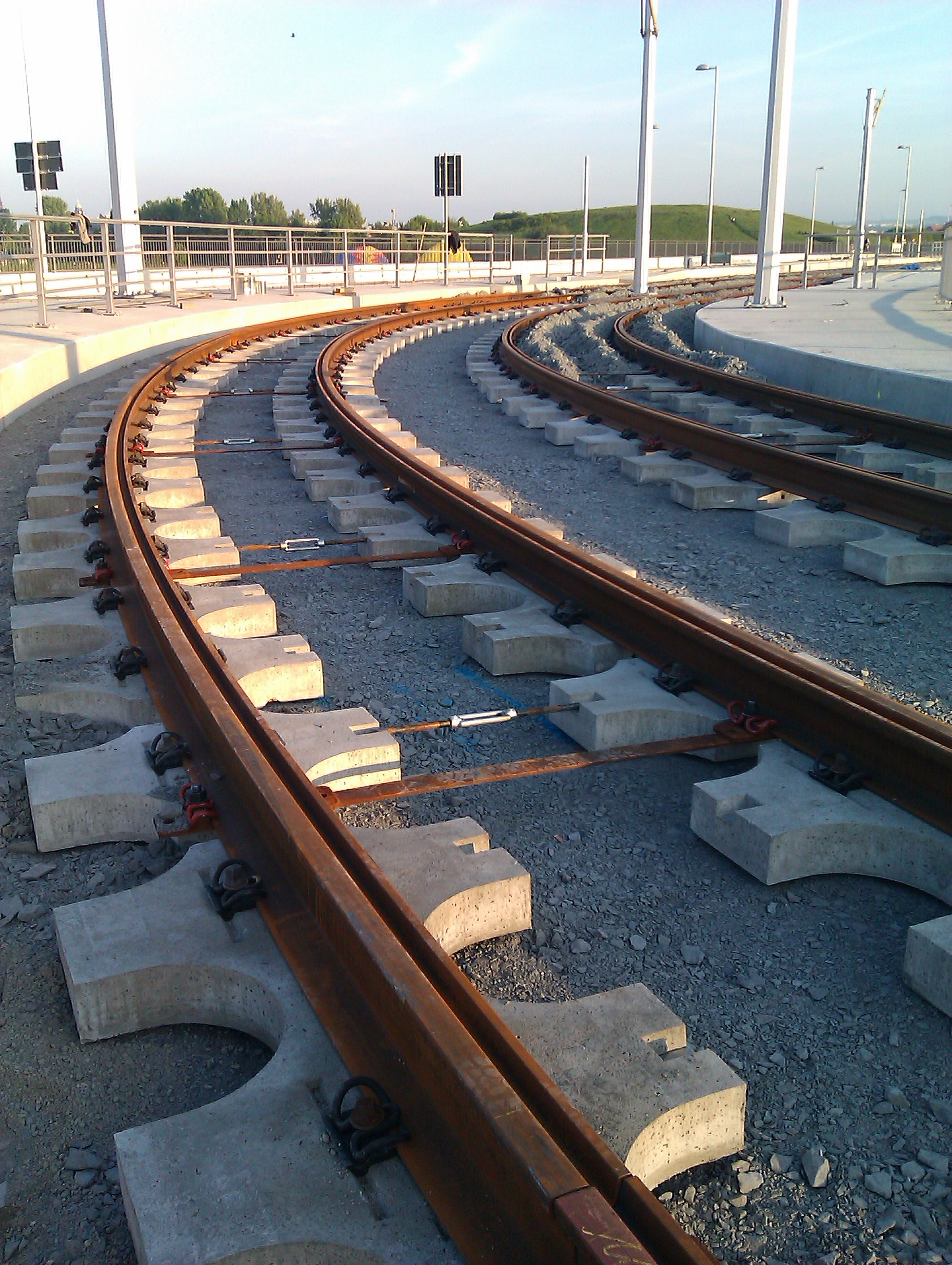 Kreuzlängsschwellengleis an der Straßenbahnhaltestelle 'Messering (Halle 1)' in Dresden während des Baus.